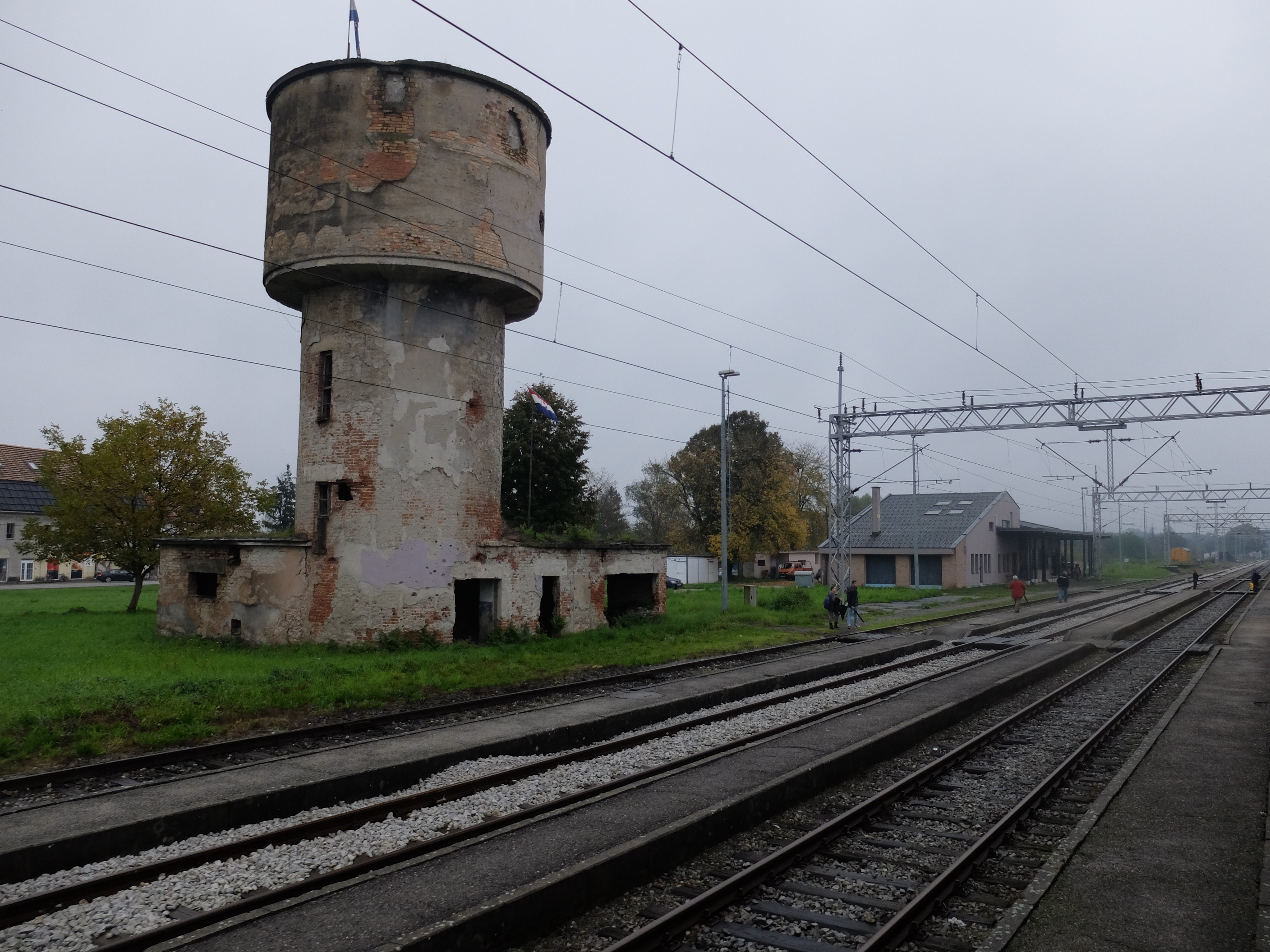 Sunja (Kolodvor)